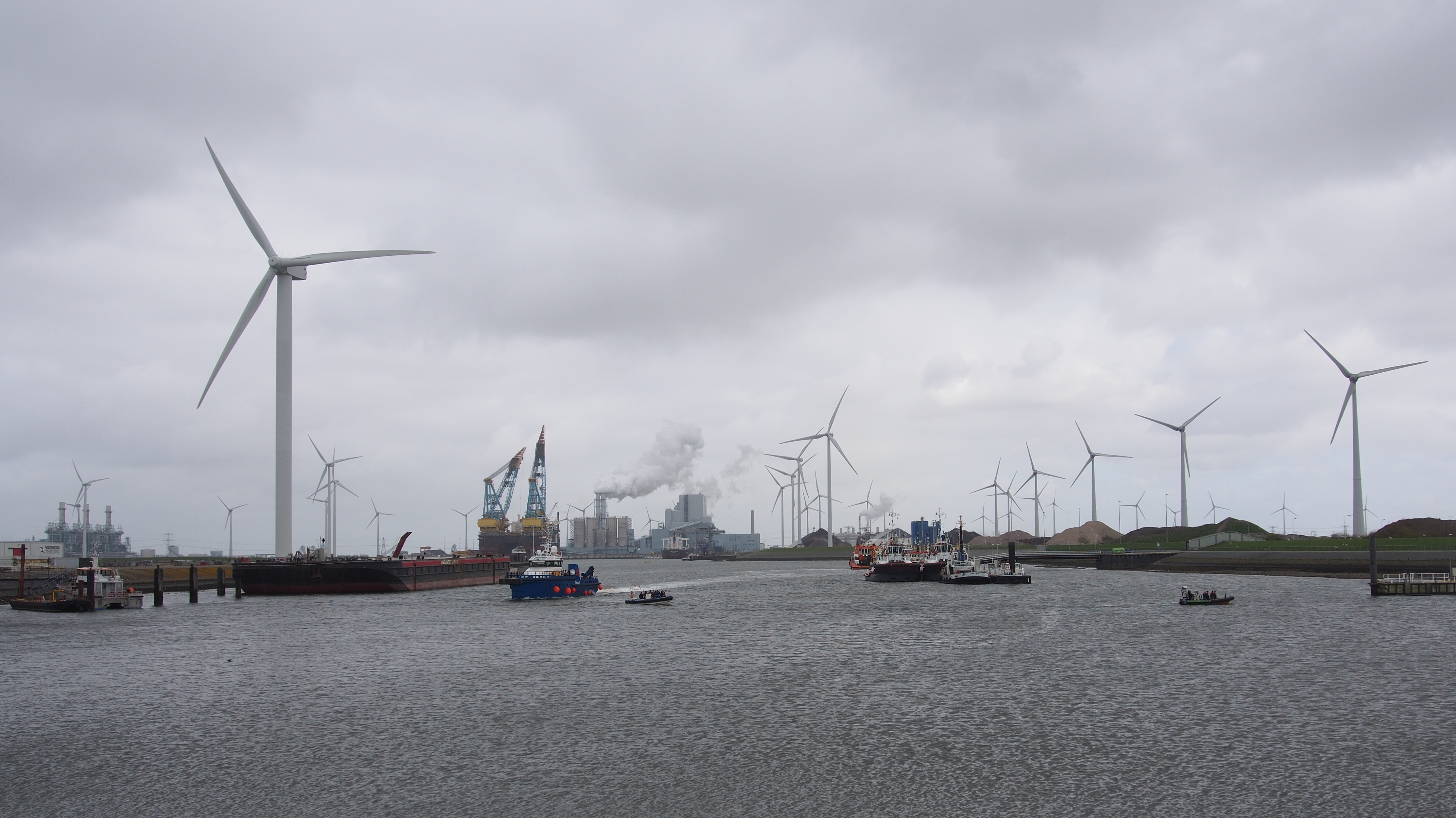 De Emmahaven van de Eemshaven. Op de achtergrond de Saipem 7000, het op een na grootste kraanschip ter wereld